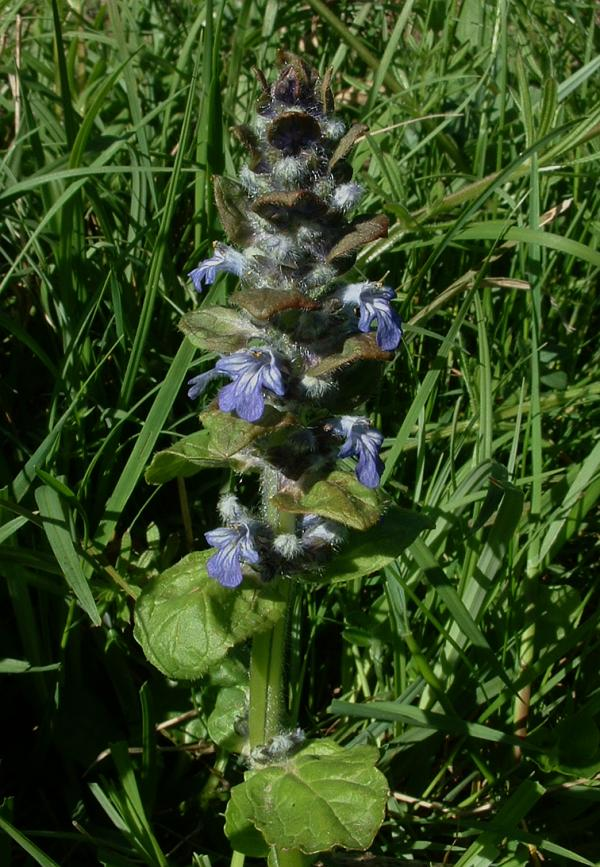 Bugle rampant, photo J.F. GAFFARD, Gy, avril 2004, licence GFDL